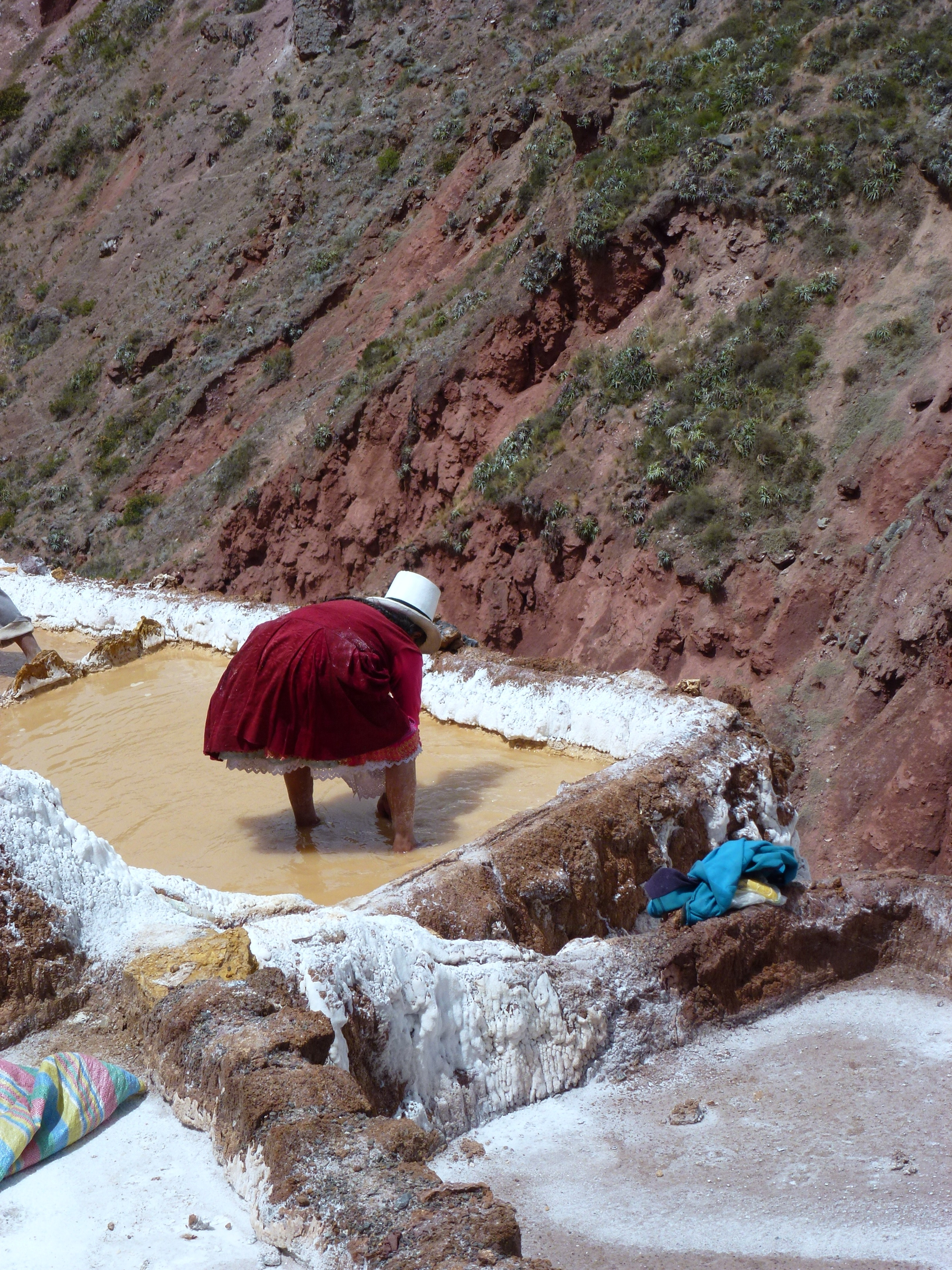 Saunier dans les salines de Maras (Pérou) Pérou